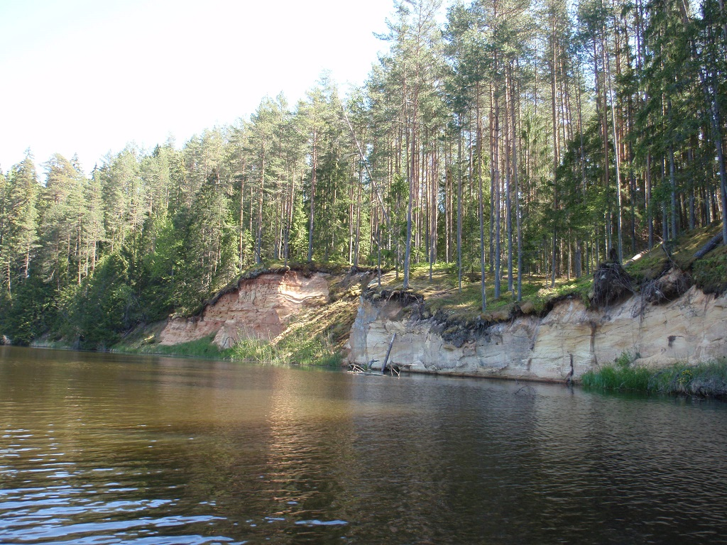 Kindapäka mägi, 2015 mai